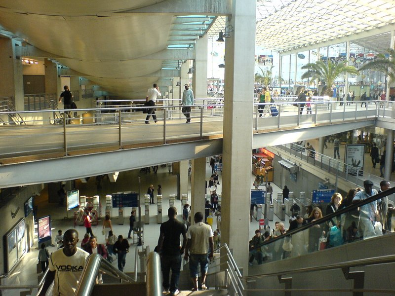 Gare du Nord coté banlieue Paris